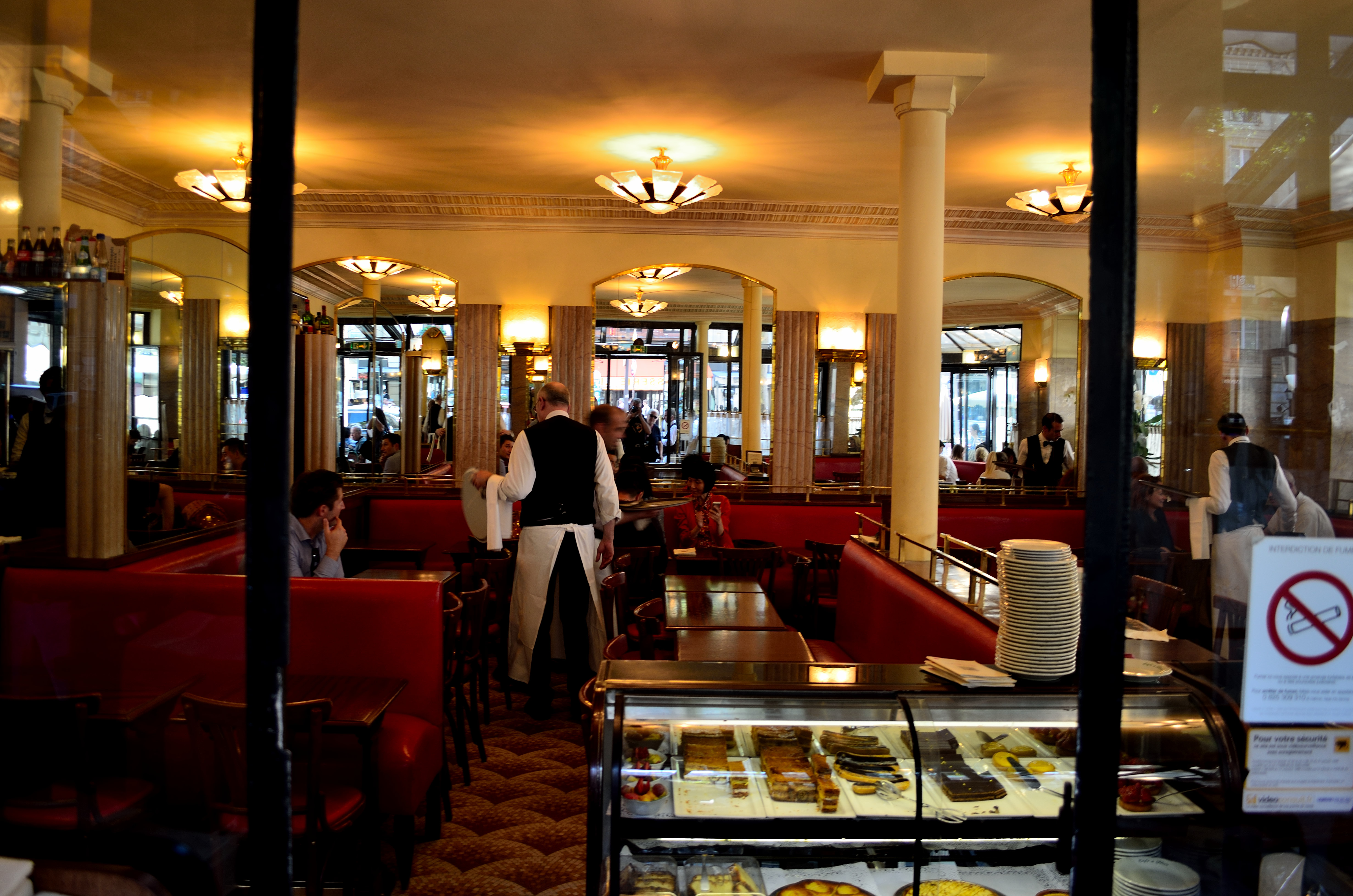 Cafe de Flore, Paris.